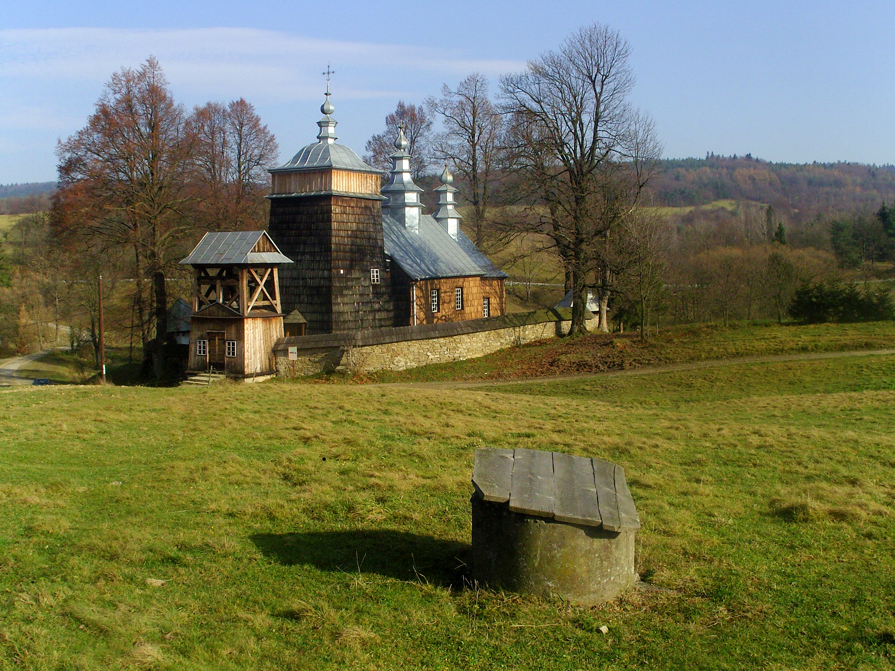 Cerkiew w Zdyni (Beskid Niski)